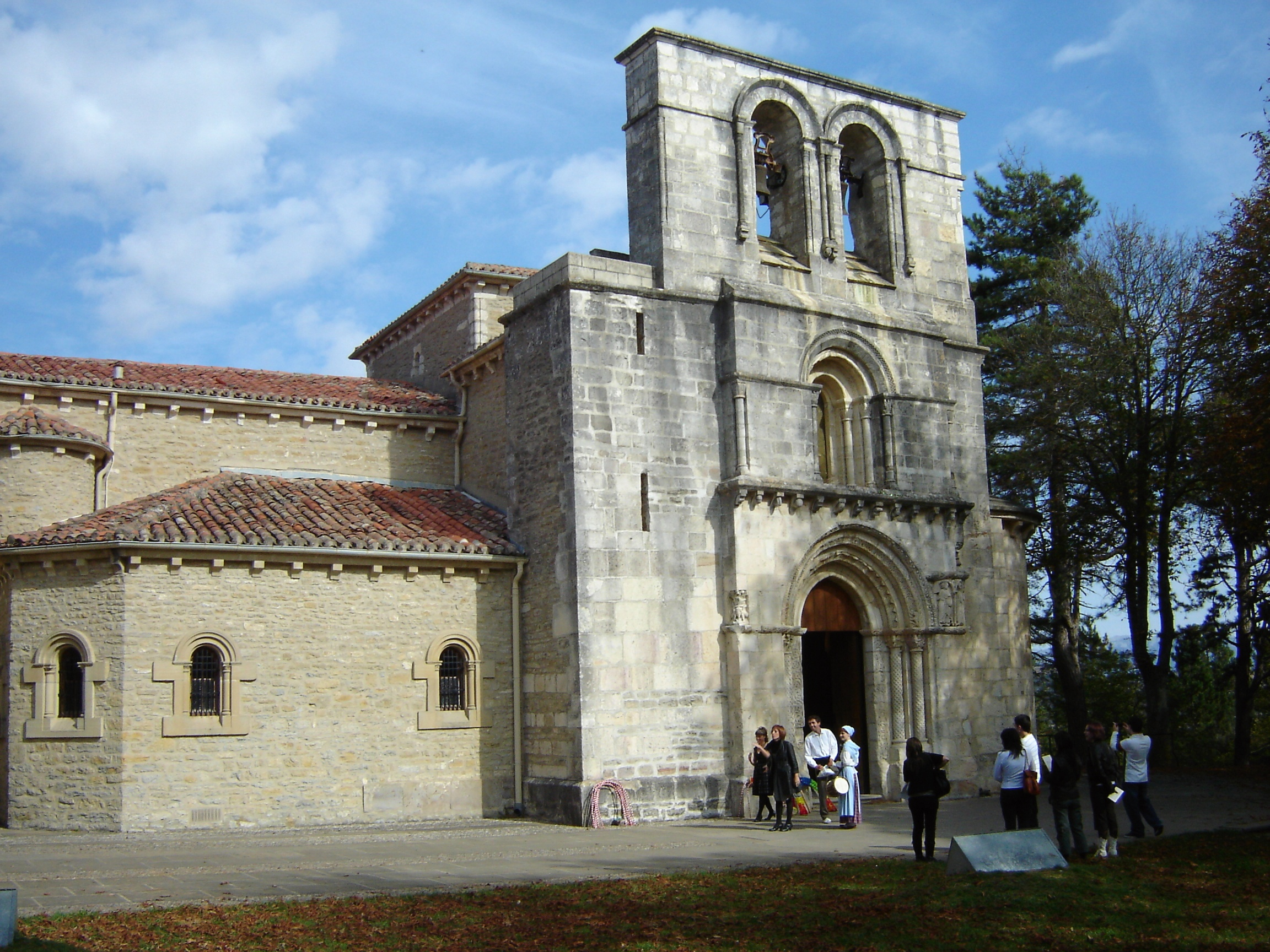 Arabako Estibalizko santutegi erromanikoa, Argandoña.